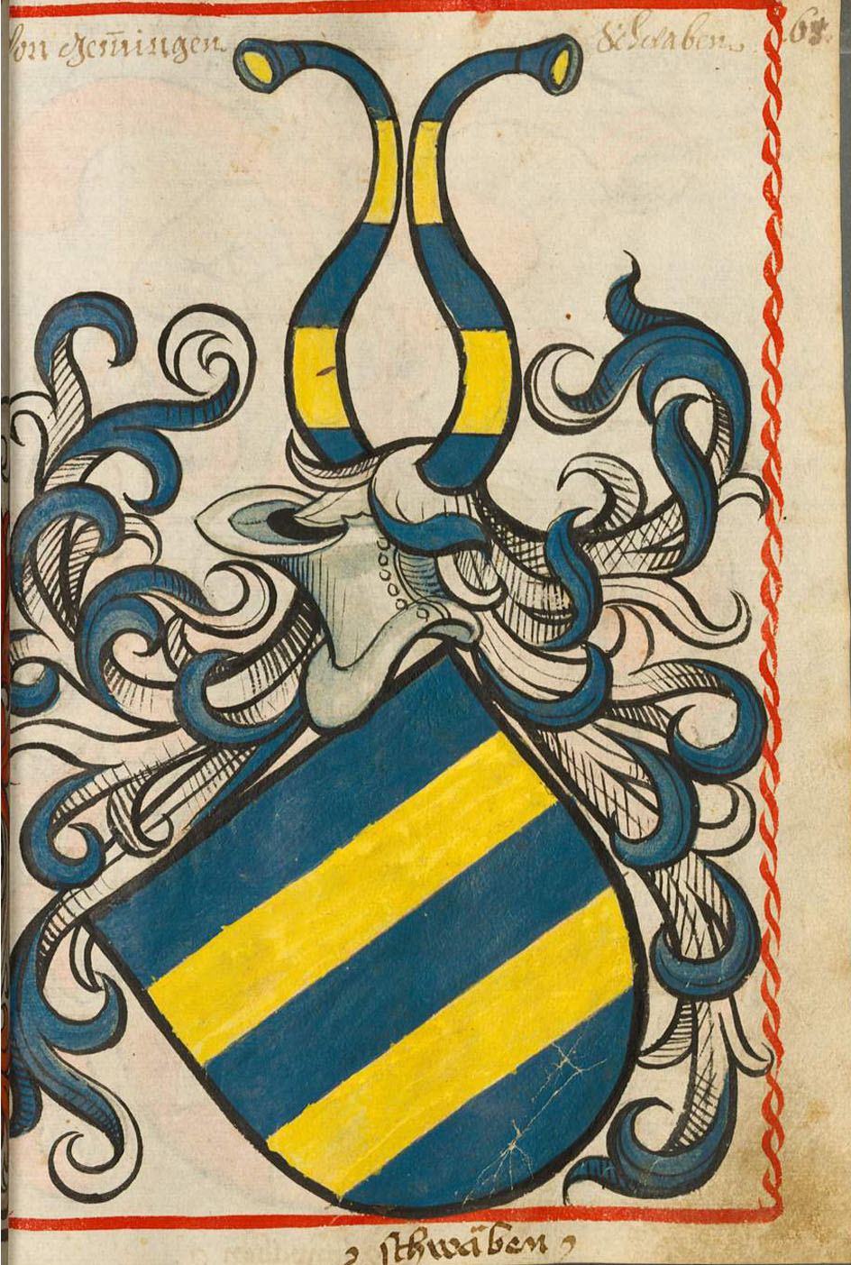 Scheibler'sches Wappenbuch, älterer Teil Gemmingen